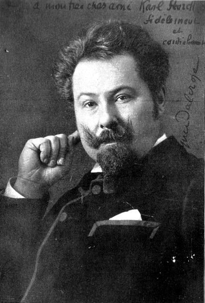 Emile Jaques-Dalcroze. Motto: Im Anfang war der Rhythmus, und der Rhythmus war bei der Kunst, und die Kunst war der Rhythmus.